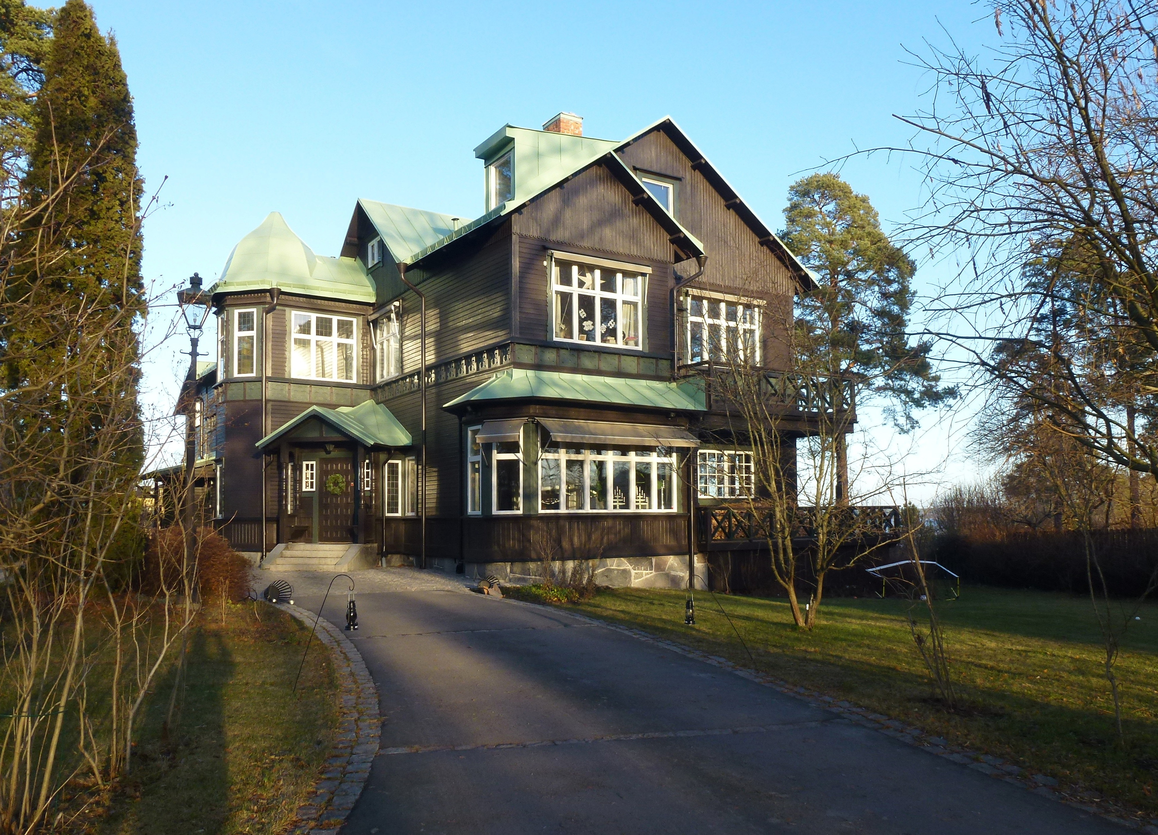 Villa Tallbacken, Slottsvägen 6B, arkitekt Ferdinand Boberg